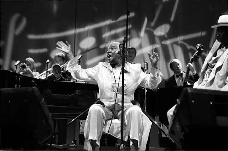 Festival International de Jazz - La Roquebrou août 2005